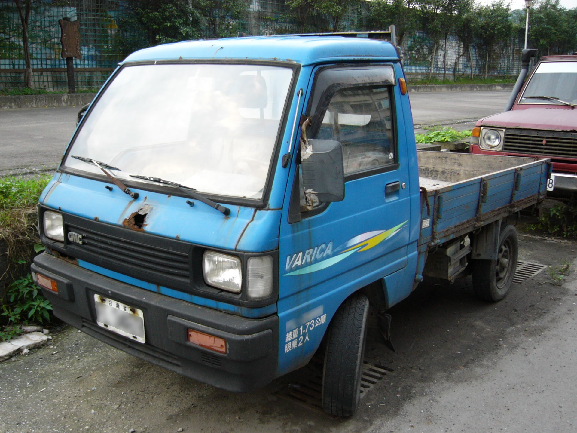 1980年代的中華威利小貨車